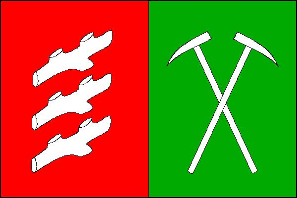 Vlajka obce Hejná